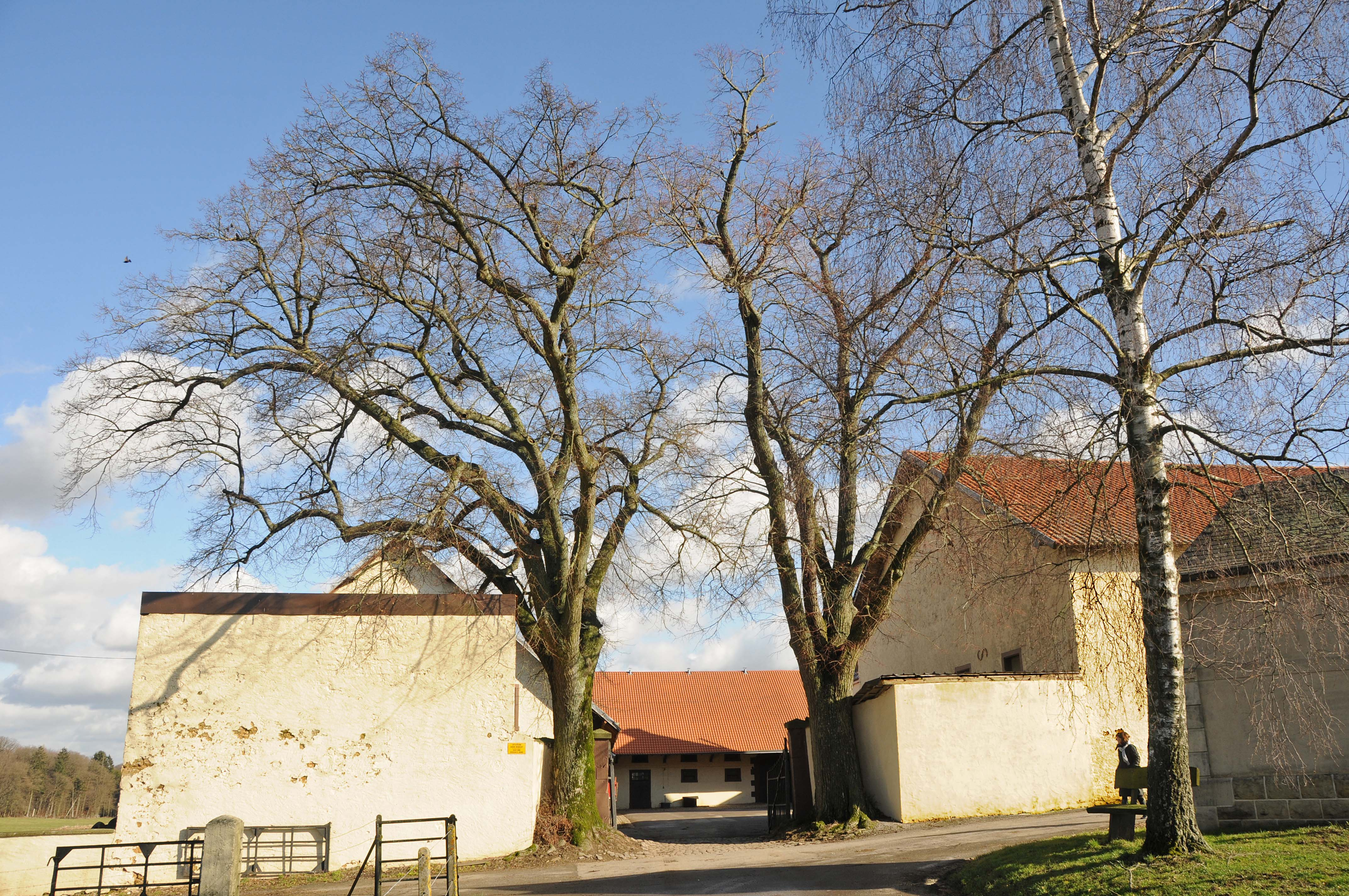 Lannen um Pläitrengerhaff.